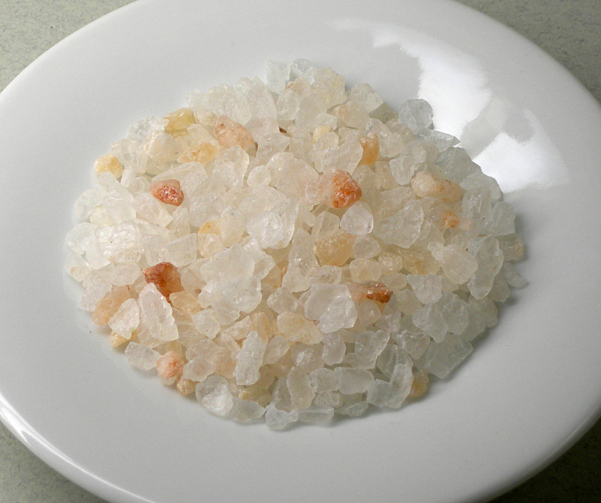 „Himalayasalz“ aus der pakistanischen Salt Range, grob zerkleinert (Kristallgröße etwa 3–5 mm)